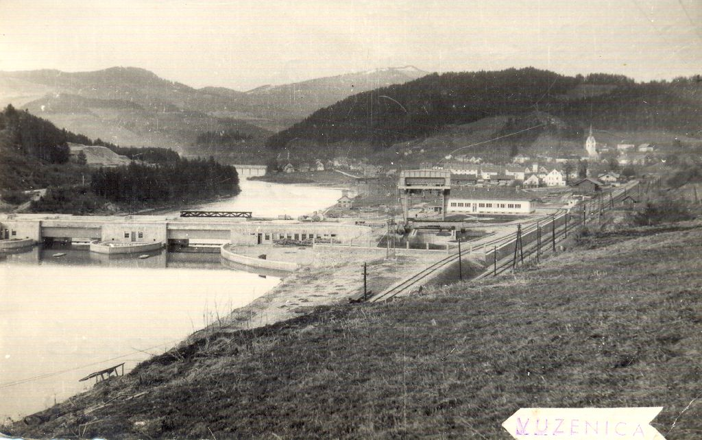 Razglednica Vuzenice.